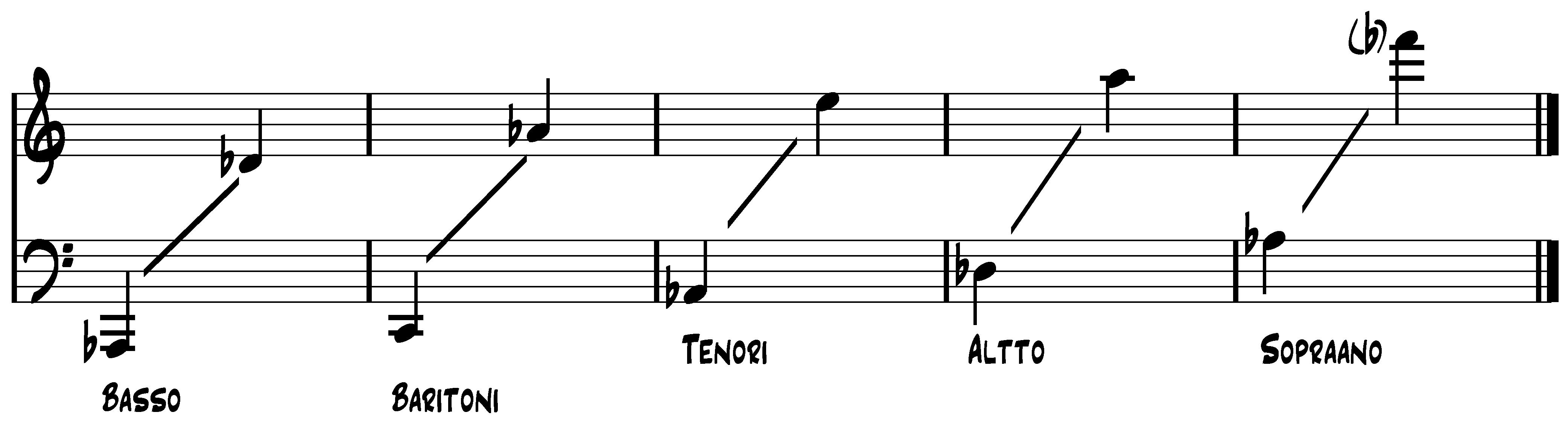 Saksofonien normaalien rekisterien äänialat